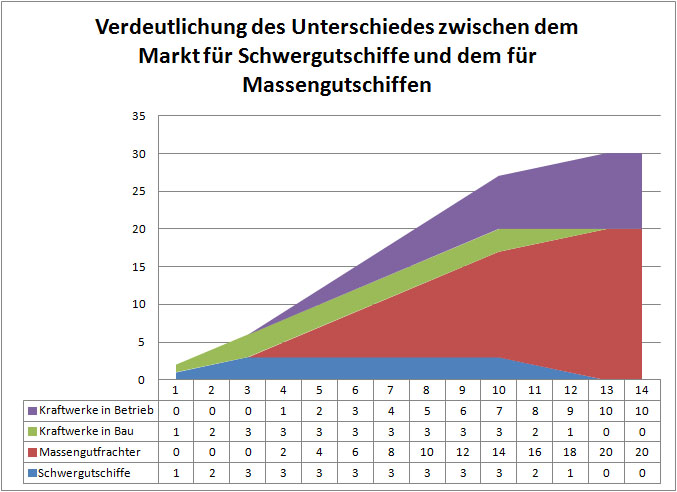 Verdeutlichung des Unterschiedes zwischen dem Markt für Schwergutschiffe und dem für Massengutschiffen. Die Die Daten sind angenommen und nur zur Verdeutlichung gedacht. Angenommen ist das pro Kraftwerk in Bau ein Schwergutschiff für den Transport der Teile benötigt wird. Für die Versorgung mit Kohle desselbigen nach Fertigstellung werden zwei Massenschüttgutschiffe benötigt.